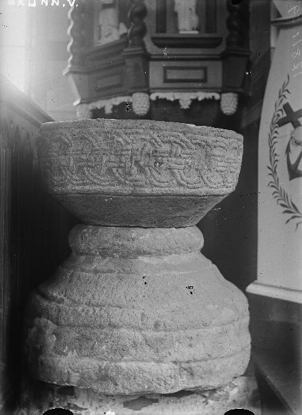 Dopfunt, sandsten, 1200-talet. Snabbinv. Kategori: (04) DopfuntarDopfunt, sandsten, 1200-talet. Snabbinv.